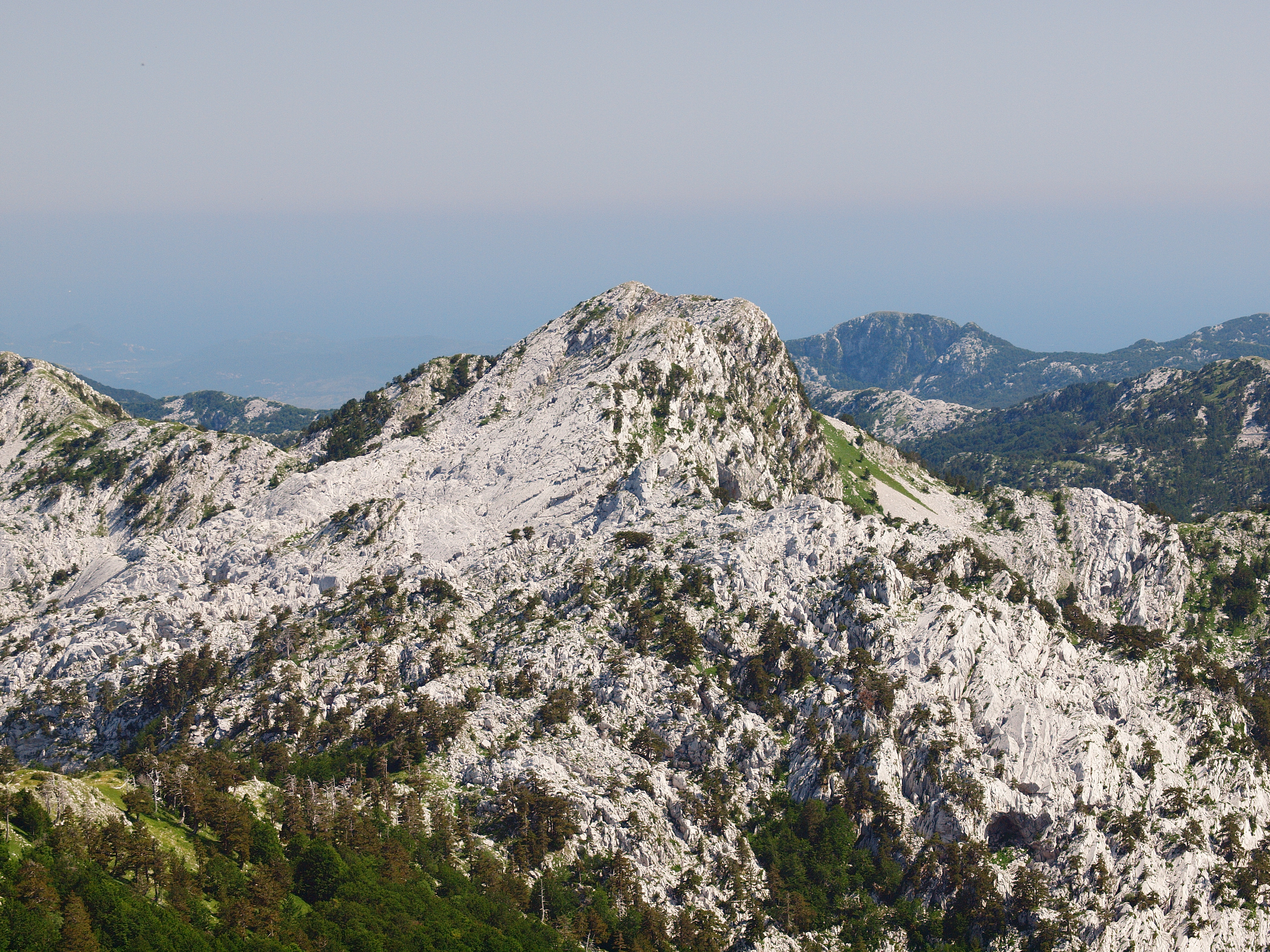 Vucji zub von der Bijela gora aus (Original text: 24.05.2002 im Orjen aufgenommen)